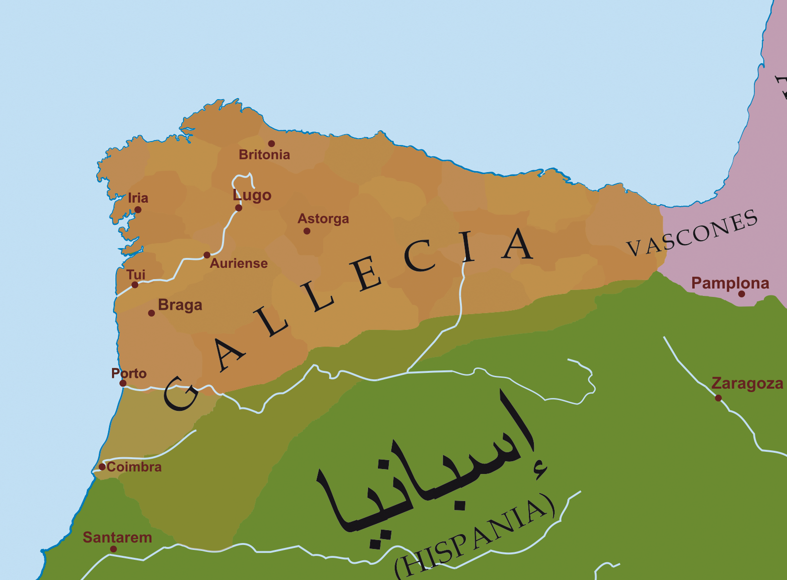 Mapa político do noroeste da peninsula ibérica tras a sustitución da Hispania visigoda, pola musulmá. Galicia aparece gobernada por numerosos señores territoriais que tentan impoñer a súa autoridade sobre os demais.